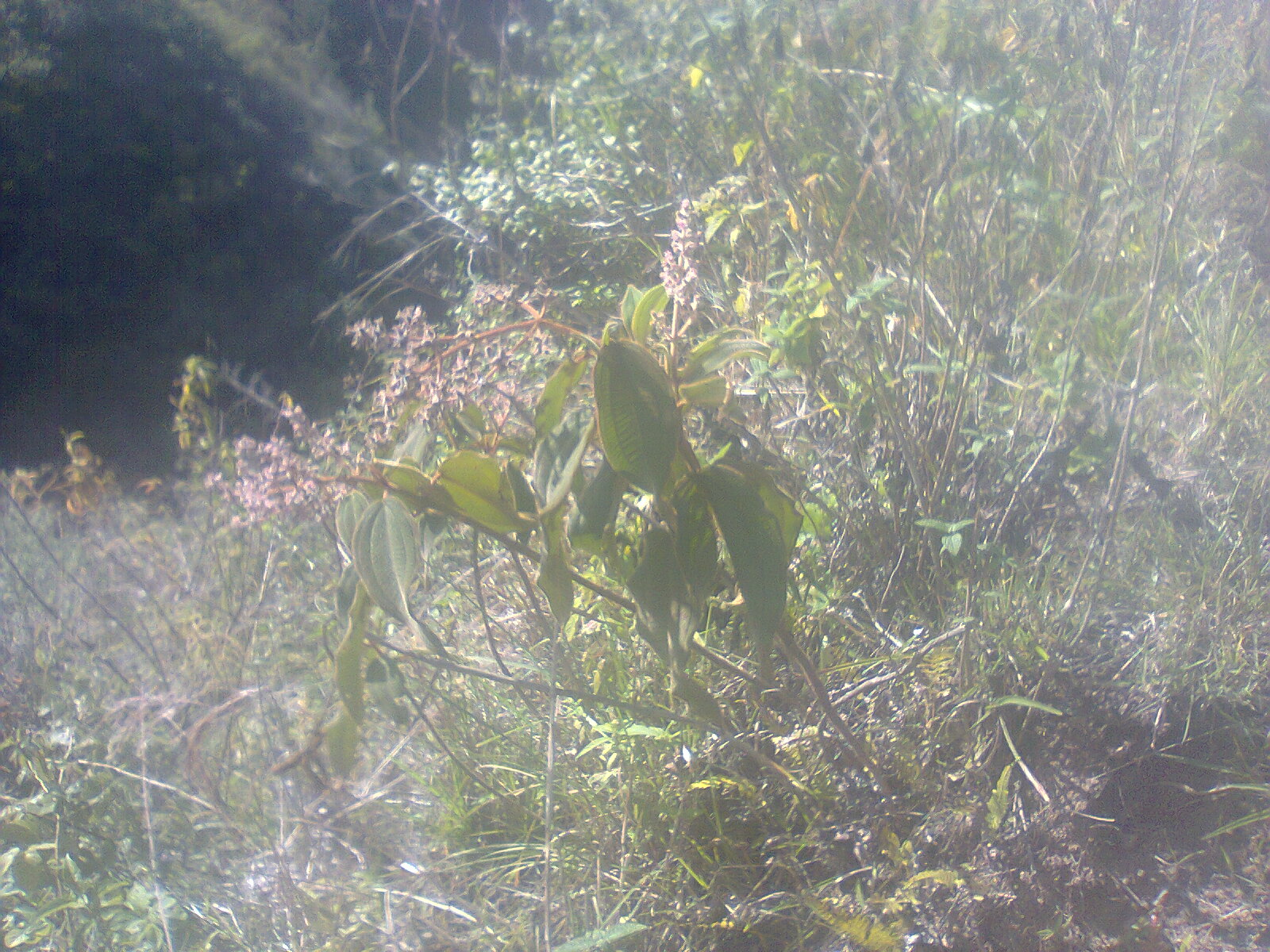 Planta que crece en forma silvestre por encima de los 2000 msnm, sus frutos son de color morado y dulce, los niños suelen comerlos.